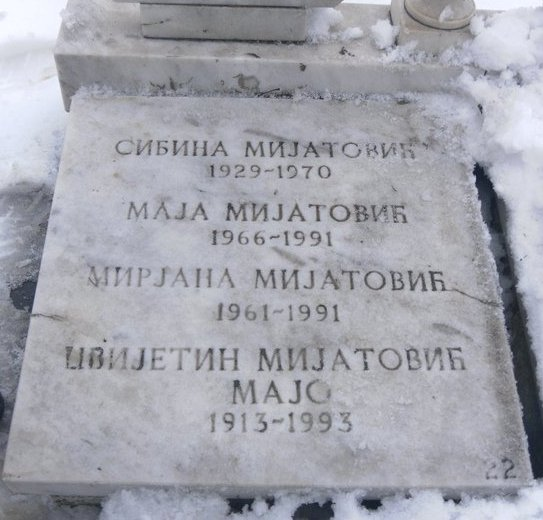 Grob Cvijetina Mijatovića, Novo groblje Beograd.